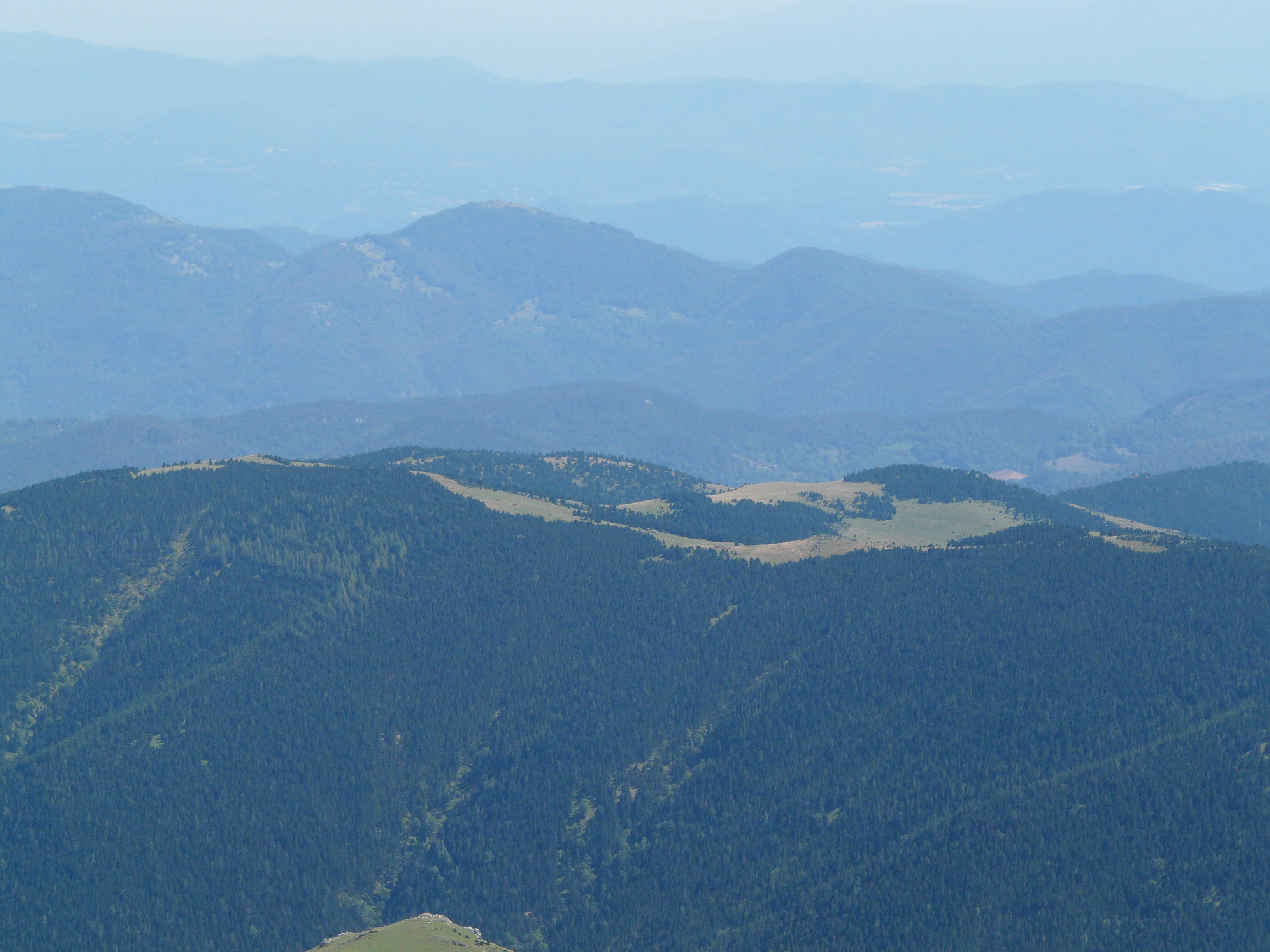 Fotografia presa en una ascensió al Costabona des de la Collada Fonda.